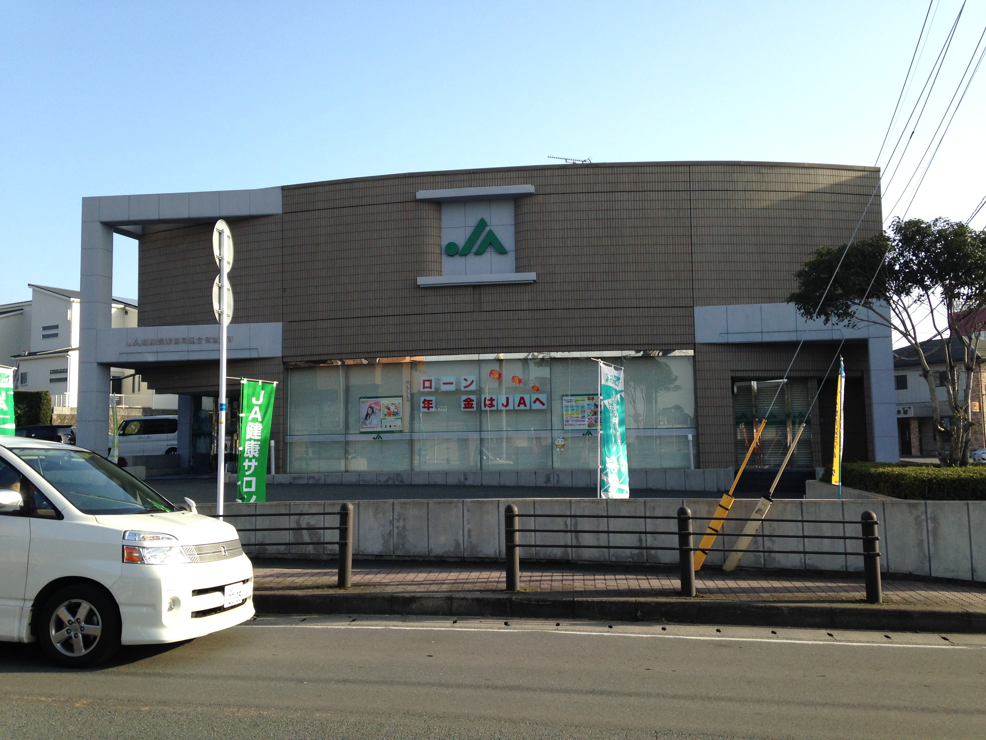 JA粕屋須恵支店